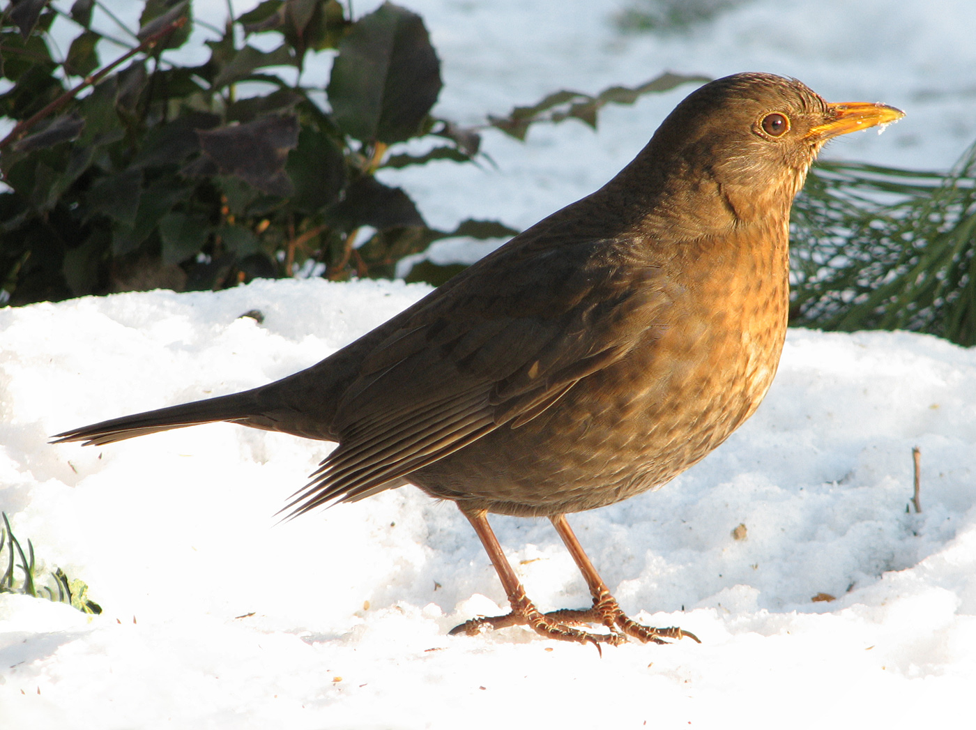 Beschreibung: Amsel / Schwarzdrossel / Eurasian Blackbird (Turdus merula) Weibchen / female